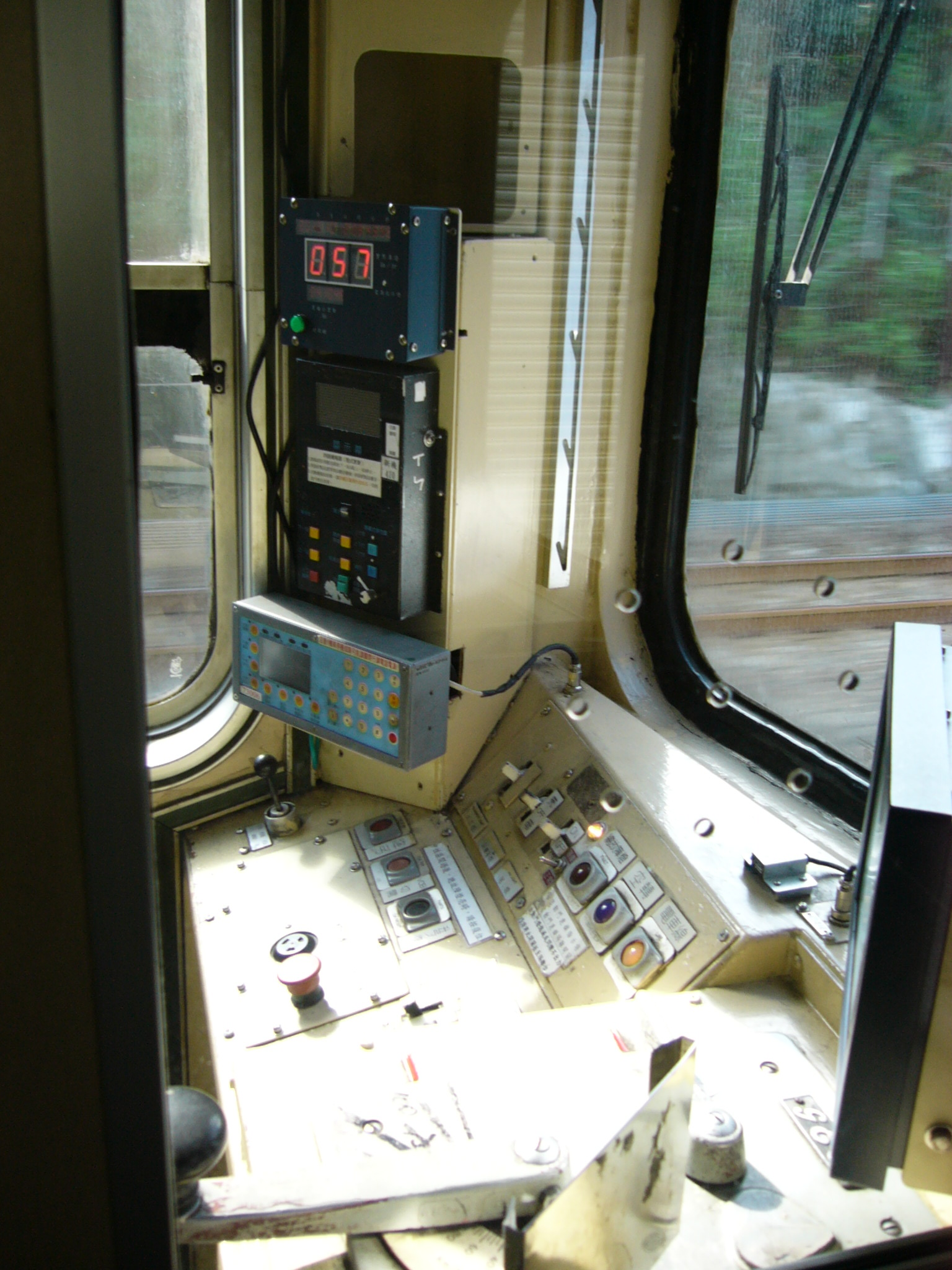 中文（台灣）: 台鐵EMU400型電聯車駕駛面板